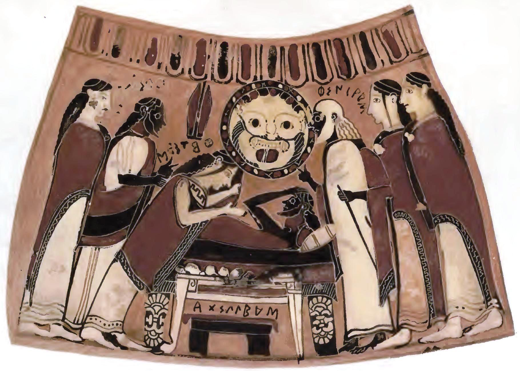 Korinthische Chytra